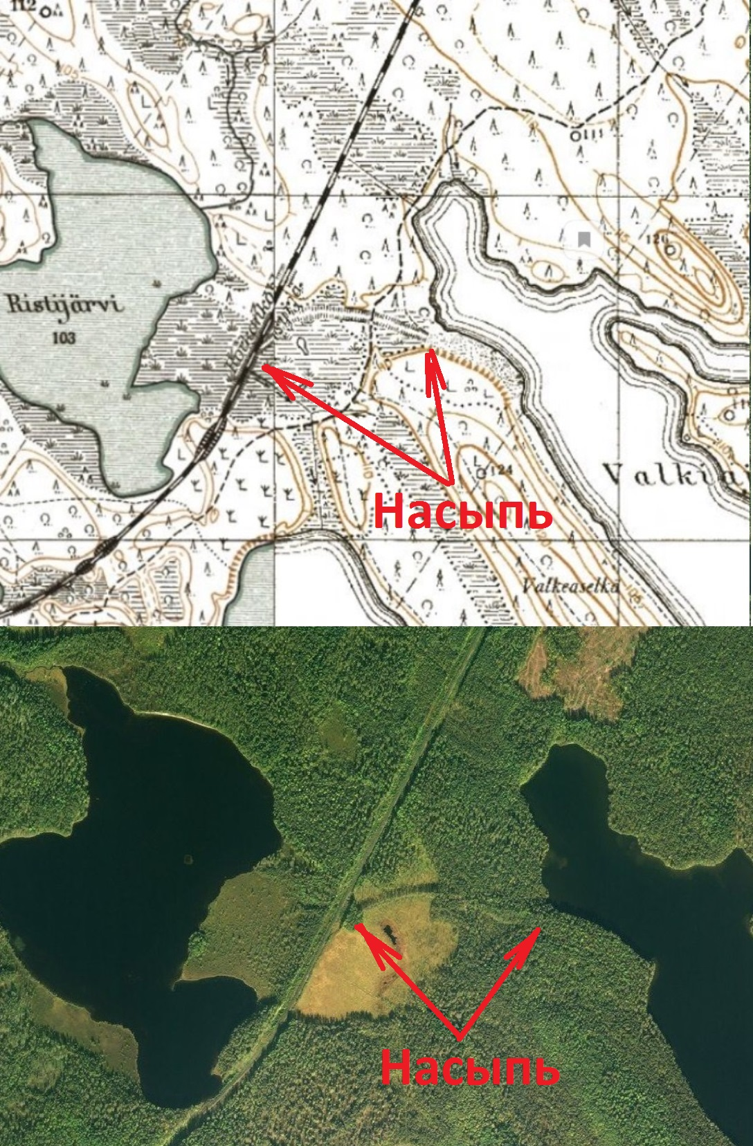 Ристиярви